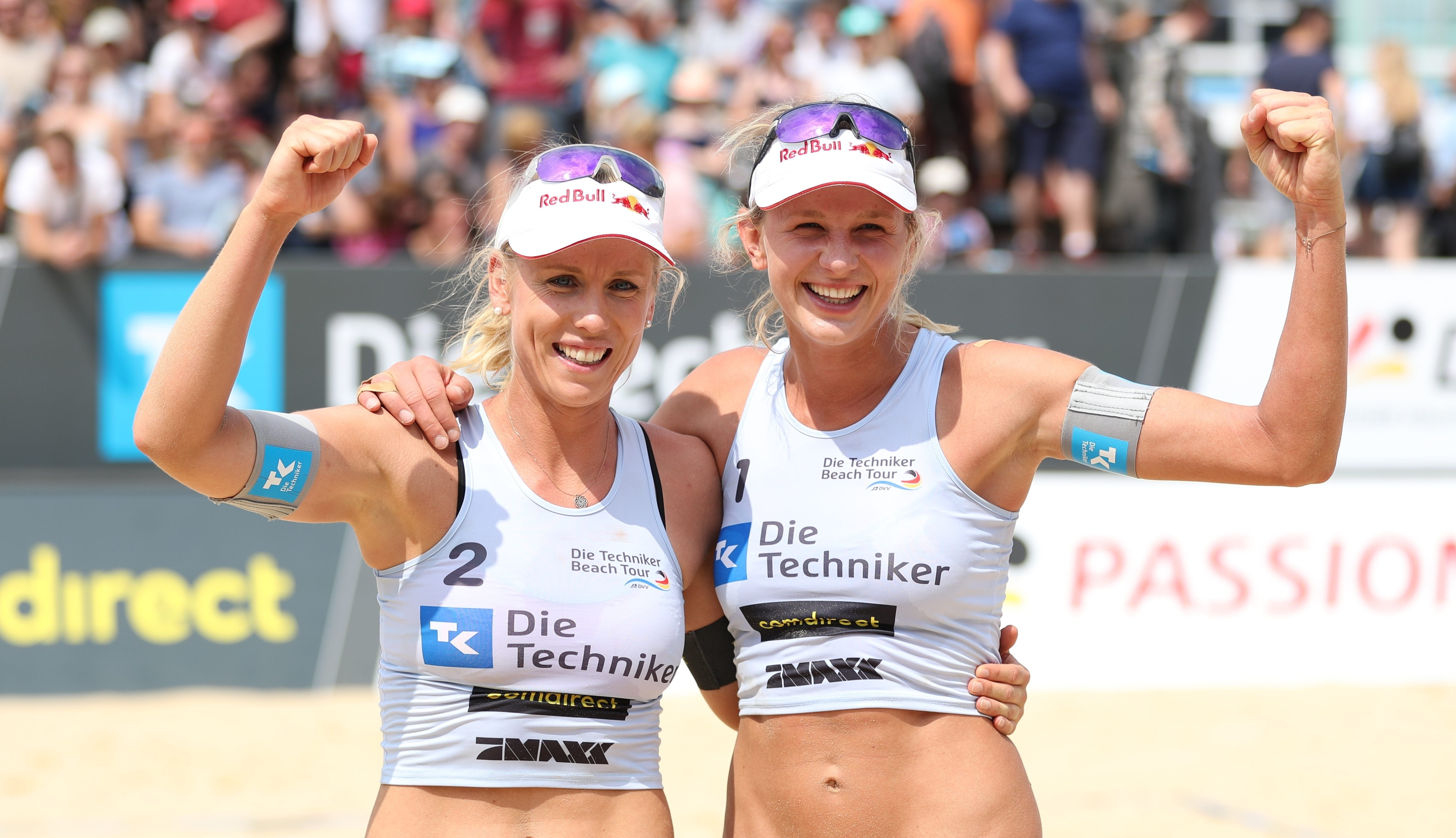 Die Techniker Beach Tour Dresden 2018